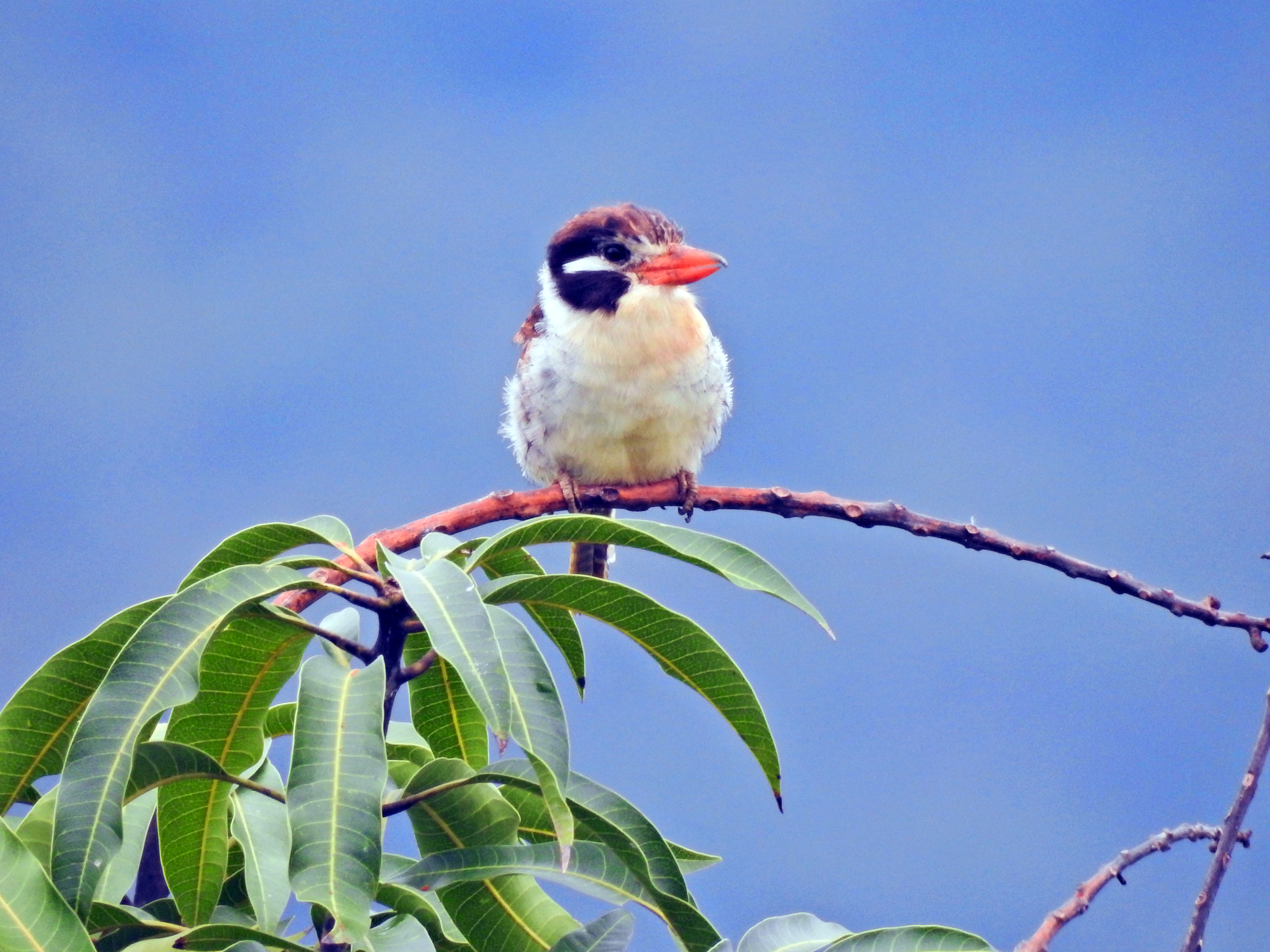 Foto tirada no sítio em Pindamonhangaba